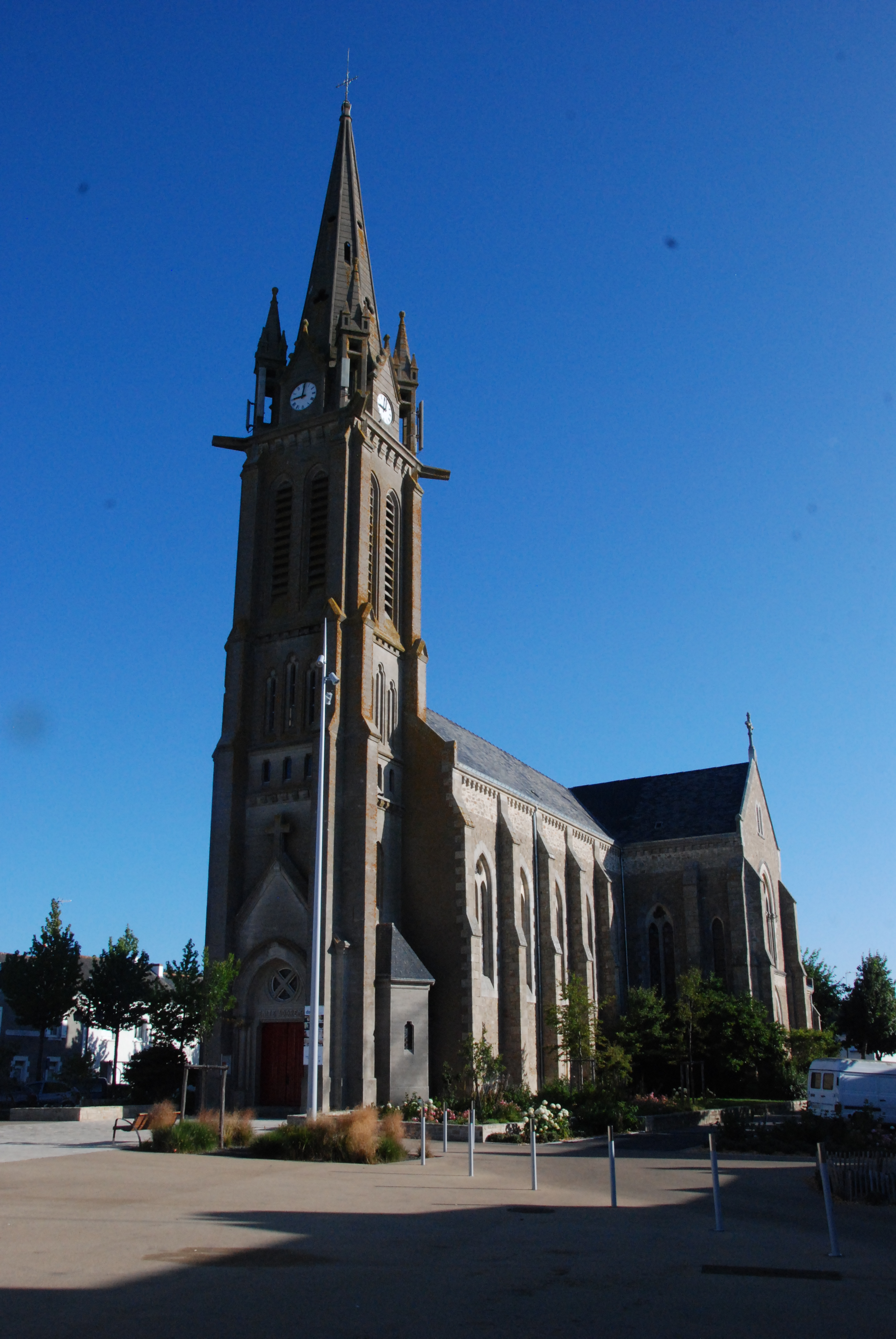 Eglise de St-André-des-Eaux (1878)